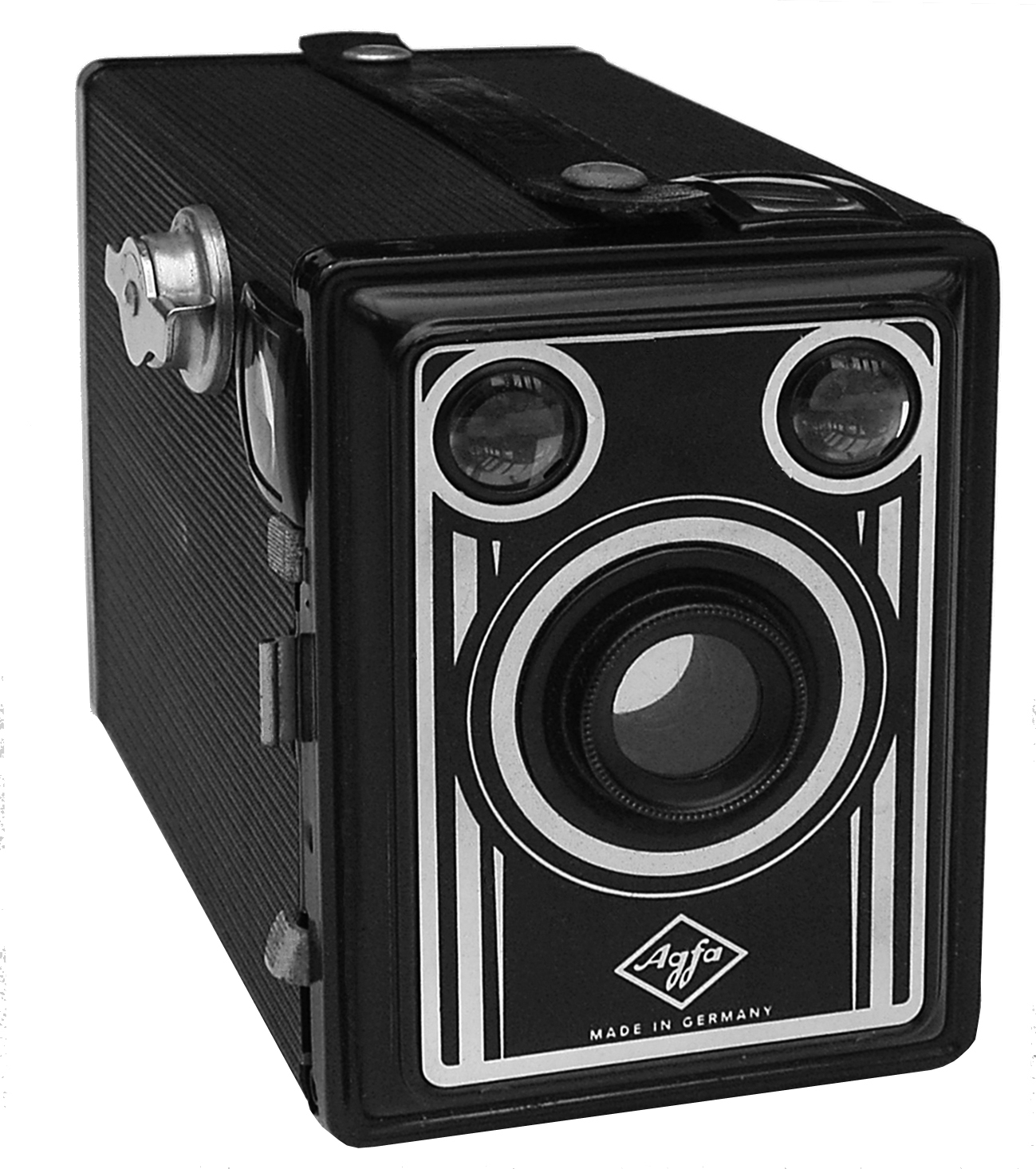 Es war die zweithäufigste Agfa-Box nach dem Krieg: Fast 600.000 Stück wurden von 1949 bis 1951 hergestellt, bevor sie von der Synchro-Box (Box 600) abgelöst wurden, von der dann bis 1957 1.630.000 Exemplare auf den Markt kamen. Die Agfa Box 50 für das Negativformat 6x9 cm war eine nur leicht veränderte Version der Vorkriegs-Box 45. Das Frontdekor wurde durch silberne Streifen ergänzt und der Rotationsverschluss beruhte auf einer neuen Konstruktion. Eine aufsteckbare Porträtlinse für den Nahbereich konnte auch dazu erworben werden. Die Box 50 kostete damals 9,90 DM.